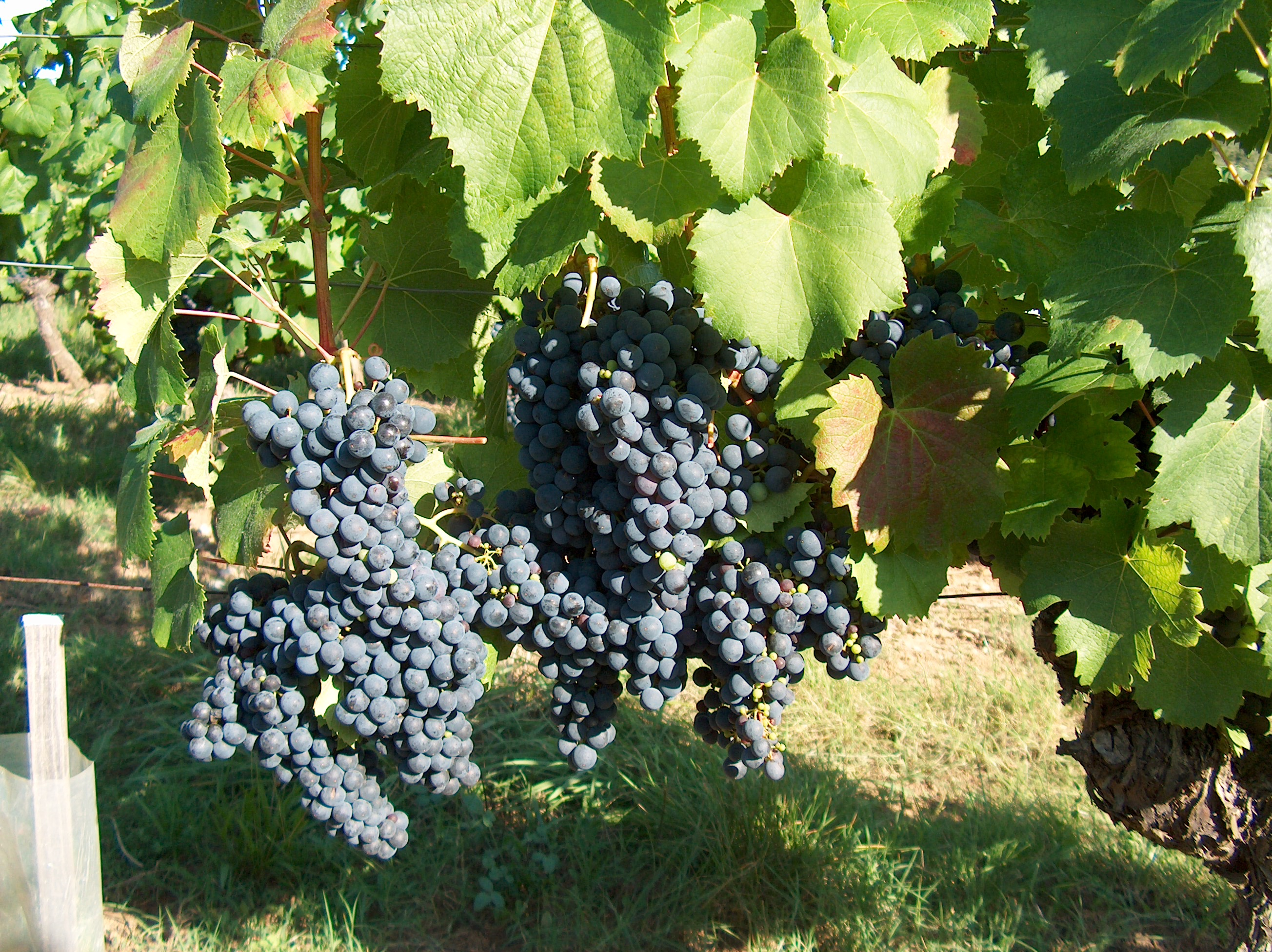 Gros plan le 12 août de grappes sur un pied dans le vignoble de Cahors sur la commune de Luzech, rive droite de la vallée du Lot en face de l'église d'Albas, située sur la rive gauche.